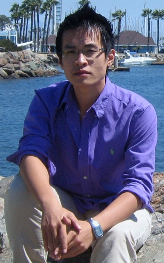 Chân dung ca sĩ Hà Anh Tuấn do tác giả chụp